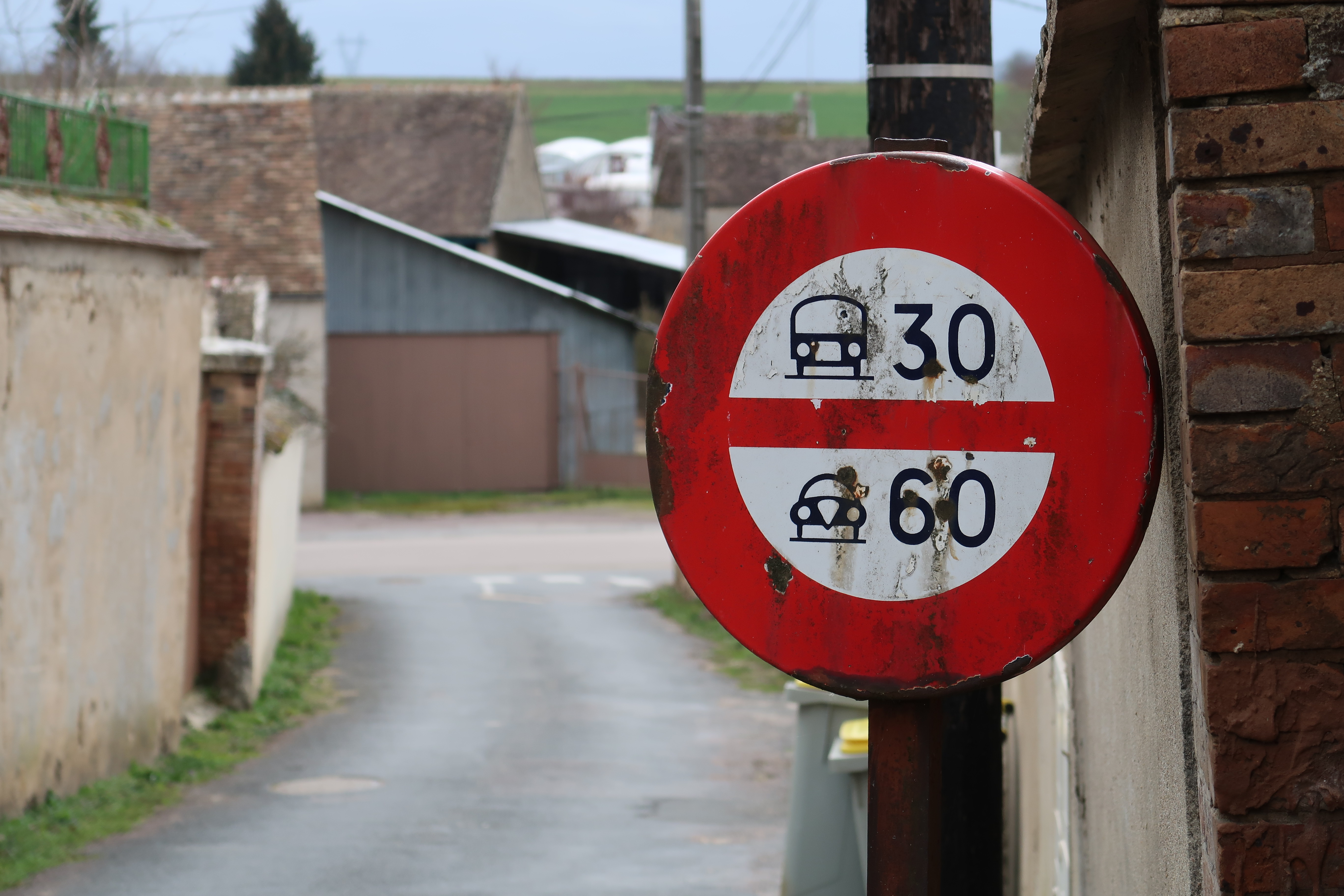 Brannay, limitation de vitesse dans la ruelle Peccard (60 pour les voitures et 30 pour les poids lourds !)